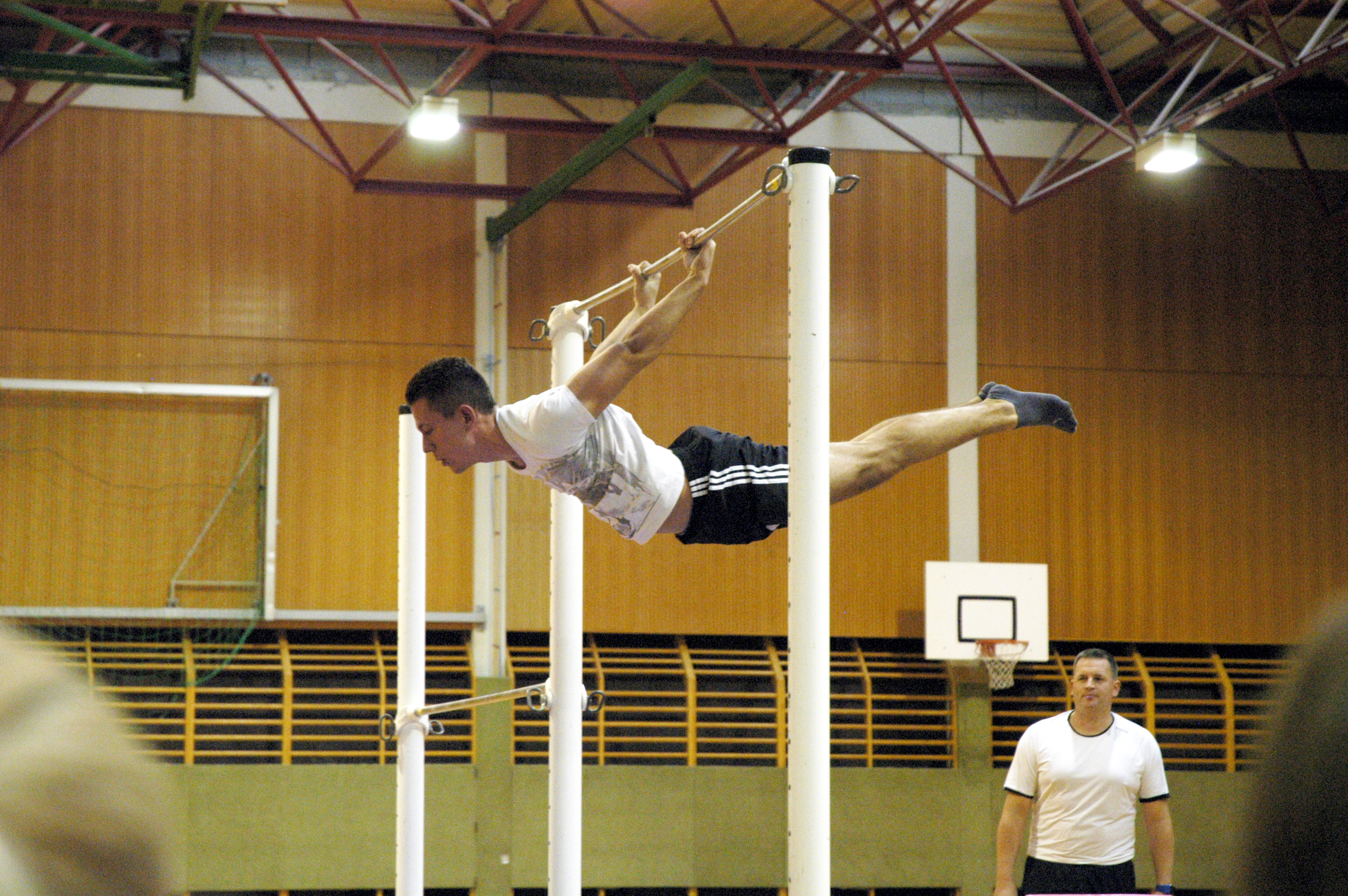 Sportliche Ausbildung am Militärrealgymnasium Wiener Neustadt